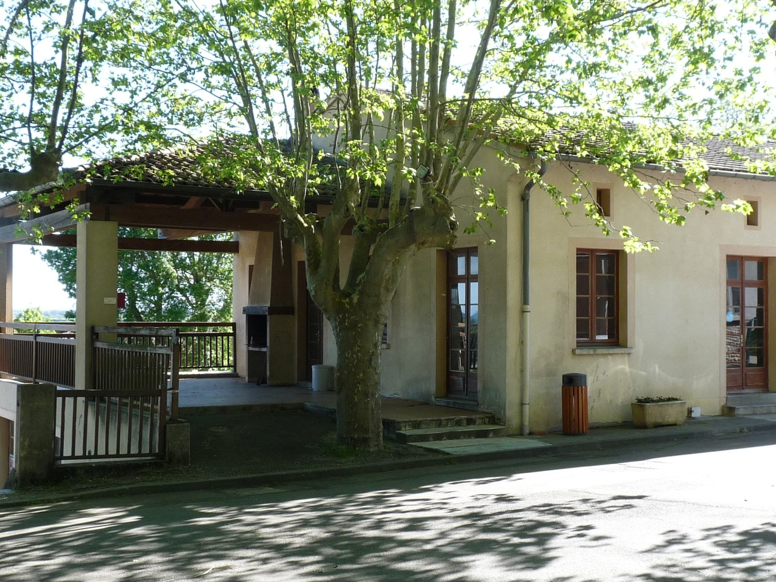 Salle des fêtes, Aigrefeuille, Haute-Garonne, France